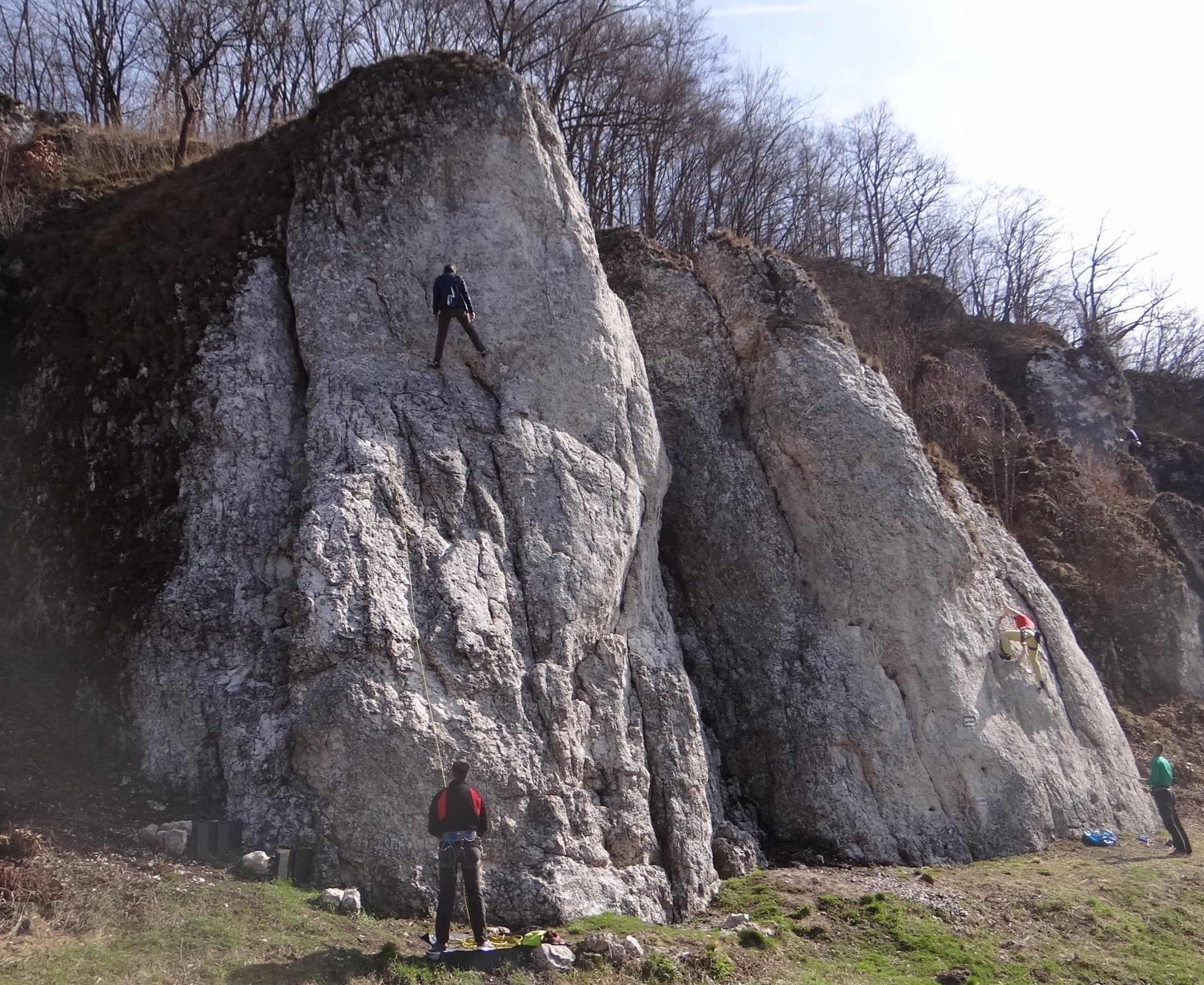 Skały Jupiter i Murawa w grupie skał nad Boiskiem w Dubiu